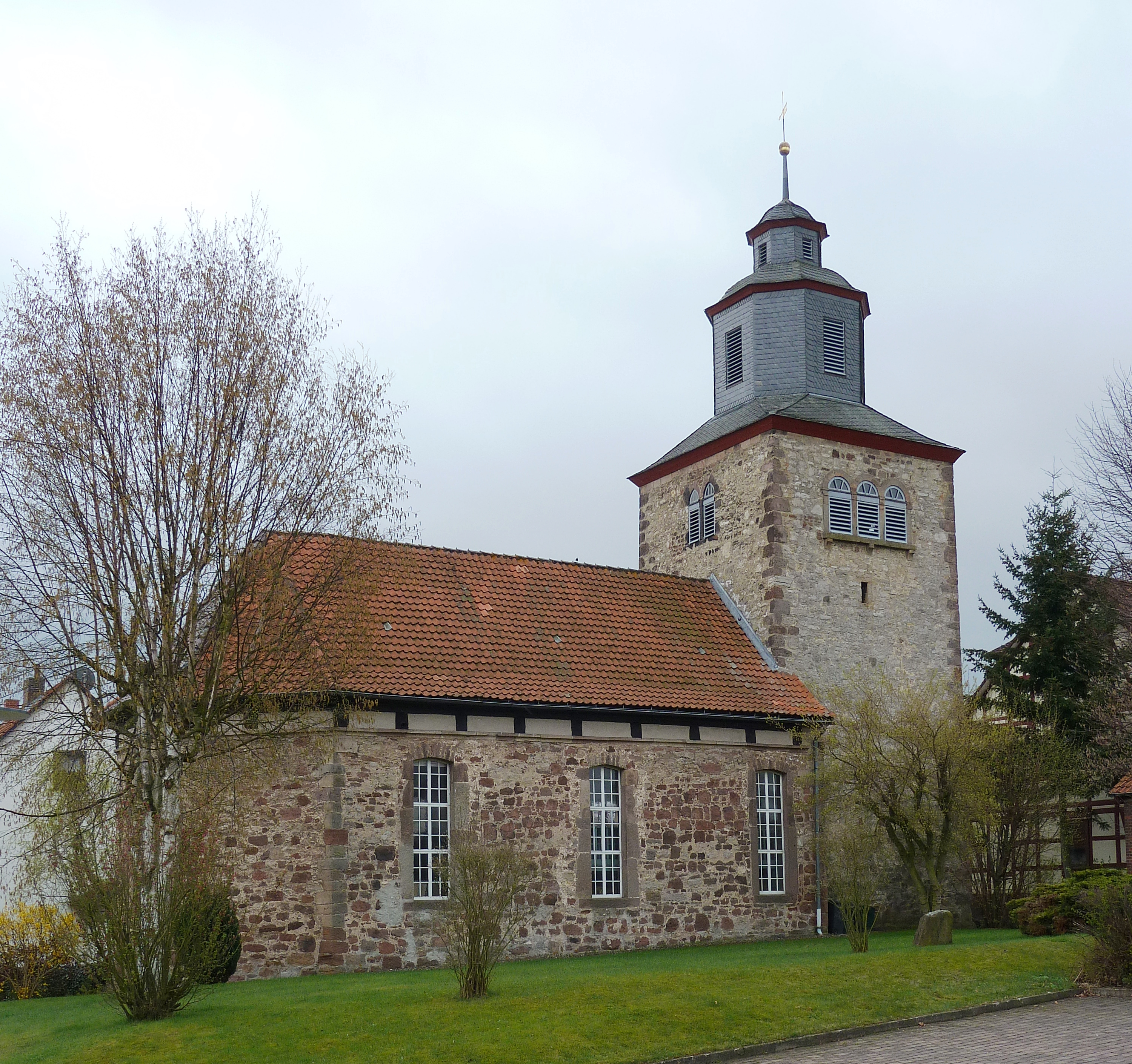 Evangelische Kirche in Hebenshausen, Gemeinde Neu-Eichenberg, Nordhessen